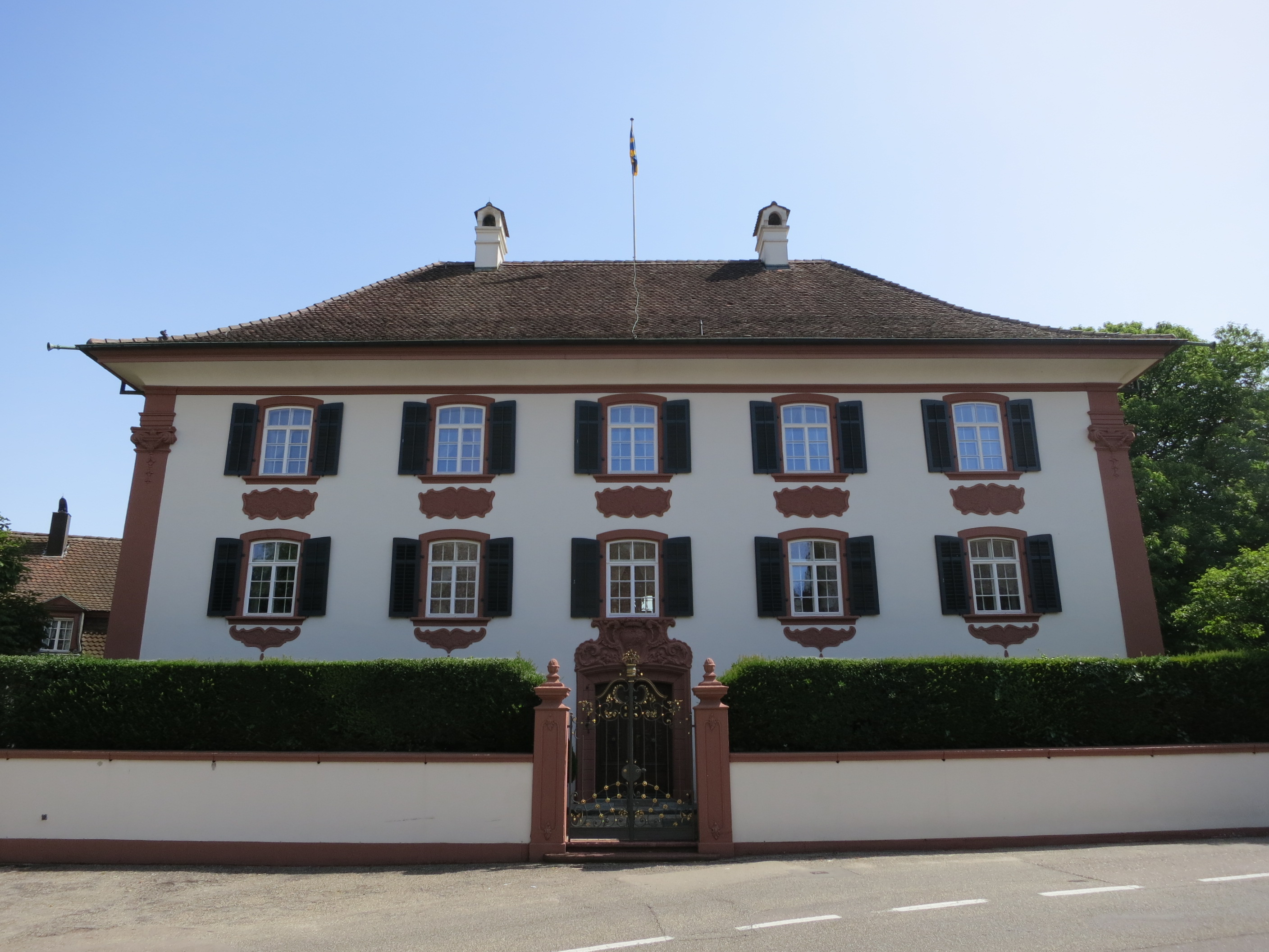 Haus zur Linde, Kaiserstuhl AG, Schweiz